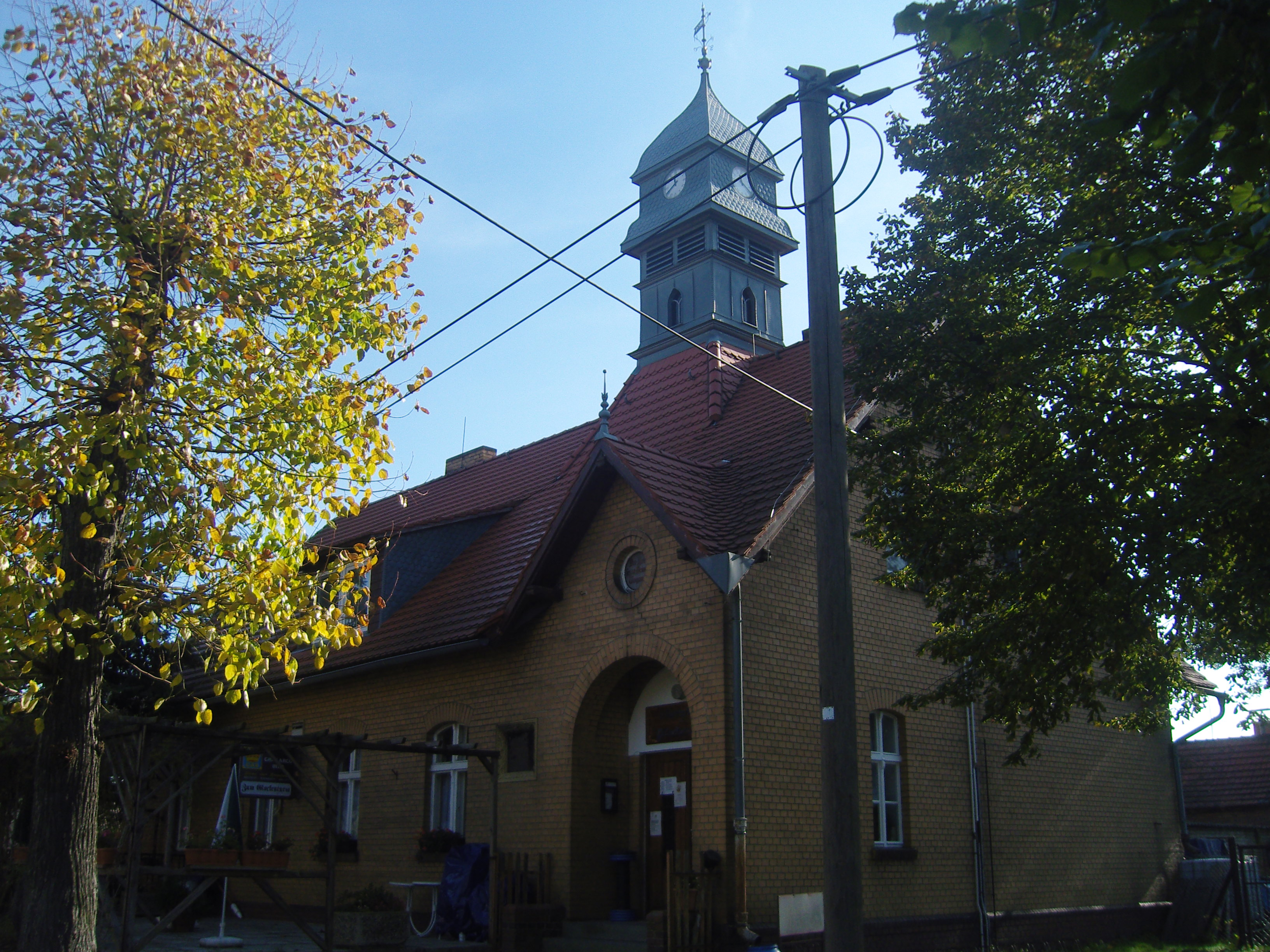 Wirtshaus “Zum Glockenturm” (alte Schule) mit Nebengebäude in Woschkow, Ortstei von Großräschen; Baudenkmal